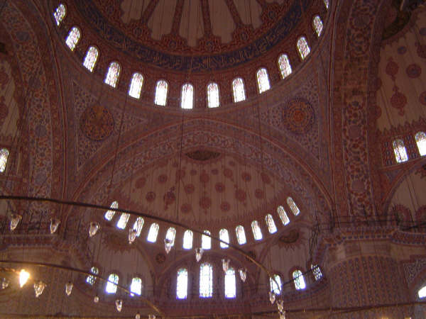 Istanbul, Moschea Blu, interno Foto scattata personalmente Categoria:moschee di Istanbul